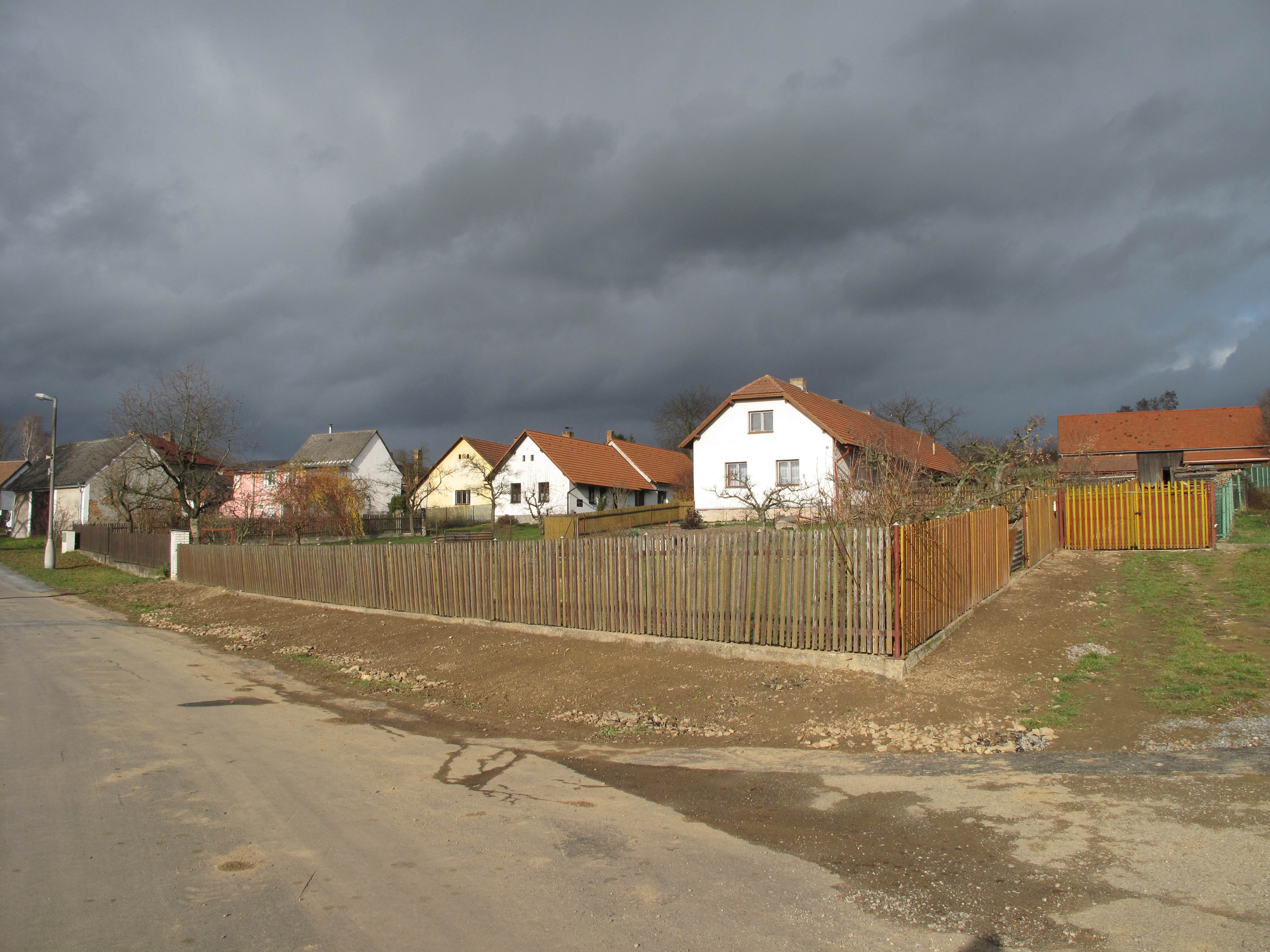 Domy v Mezně. Okres Benešov, Česká republika.